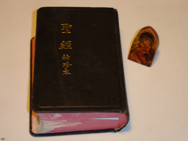 由虎兒於2004.10.14在家中拍攝。 圖像說明 這是一本中文的天主教圣经，通称「思高圣经译释本」或「思高圣经（Si Gao Sheng Jing） [1]。 舊約方面：是採用瑪索辣經卷作爲底本，主要是基特耳(R. Kittel)的希伯來文聖經(Biblia Hebraica)第3版(1927，1945)。新約方面：譯文的藍本以默爾克所校勘的希臘文《新約全書》第七版(Augustinus Merk. Novum Testamentum: Graece et Latine. ed. Septima, Rome: Pontificii Instituti Biblici, 1951)作爲藍本，與基督新教和合本聖經在名詞上的中文翻譯有所不同。